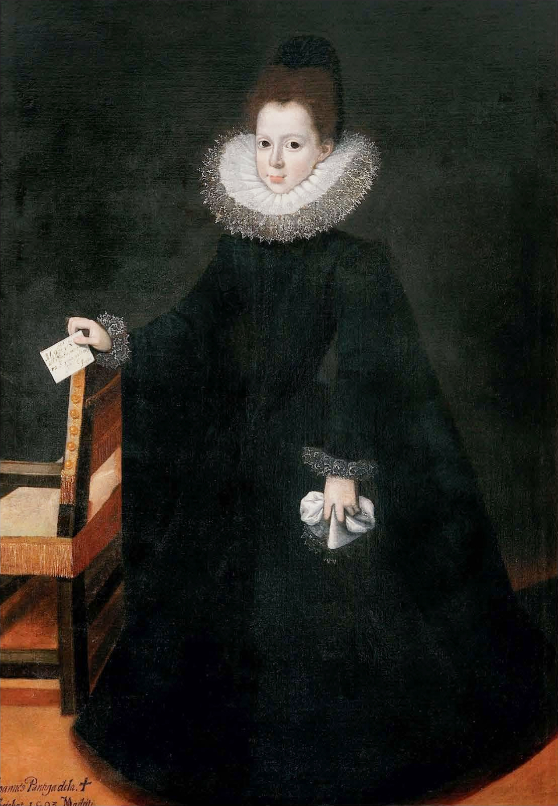 María Luisa de Aragón, duquesa de Villahermosa (c.1583-1663), hija de una de las hermanas de Polyxena de Lobkowitz. El retrato fue dedicado a María Manrique de Lara, abuela de la chiquilla que en la pintura tiene 7 años, pero parece una mujer adulta por su vestido de luto llevado en memoria de su padre que un año antes muriera en la cárcel.